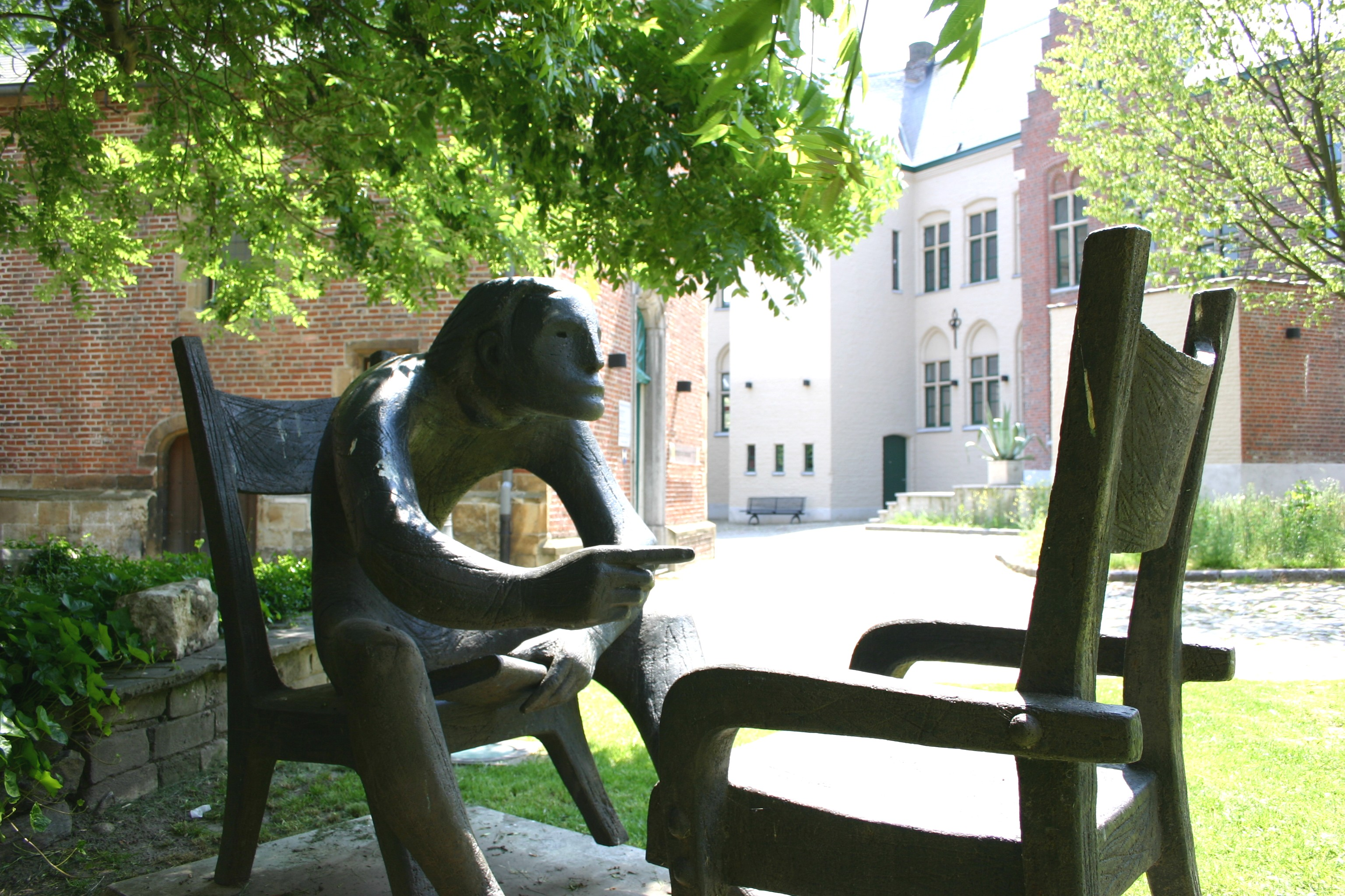 Standbeeld ter ere van Louis Paul Boon door de beeldhouwer Marc De Bruyn op de binnenkoer van het Stedelijk museum 't Gasthuys in Aalst (2012)